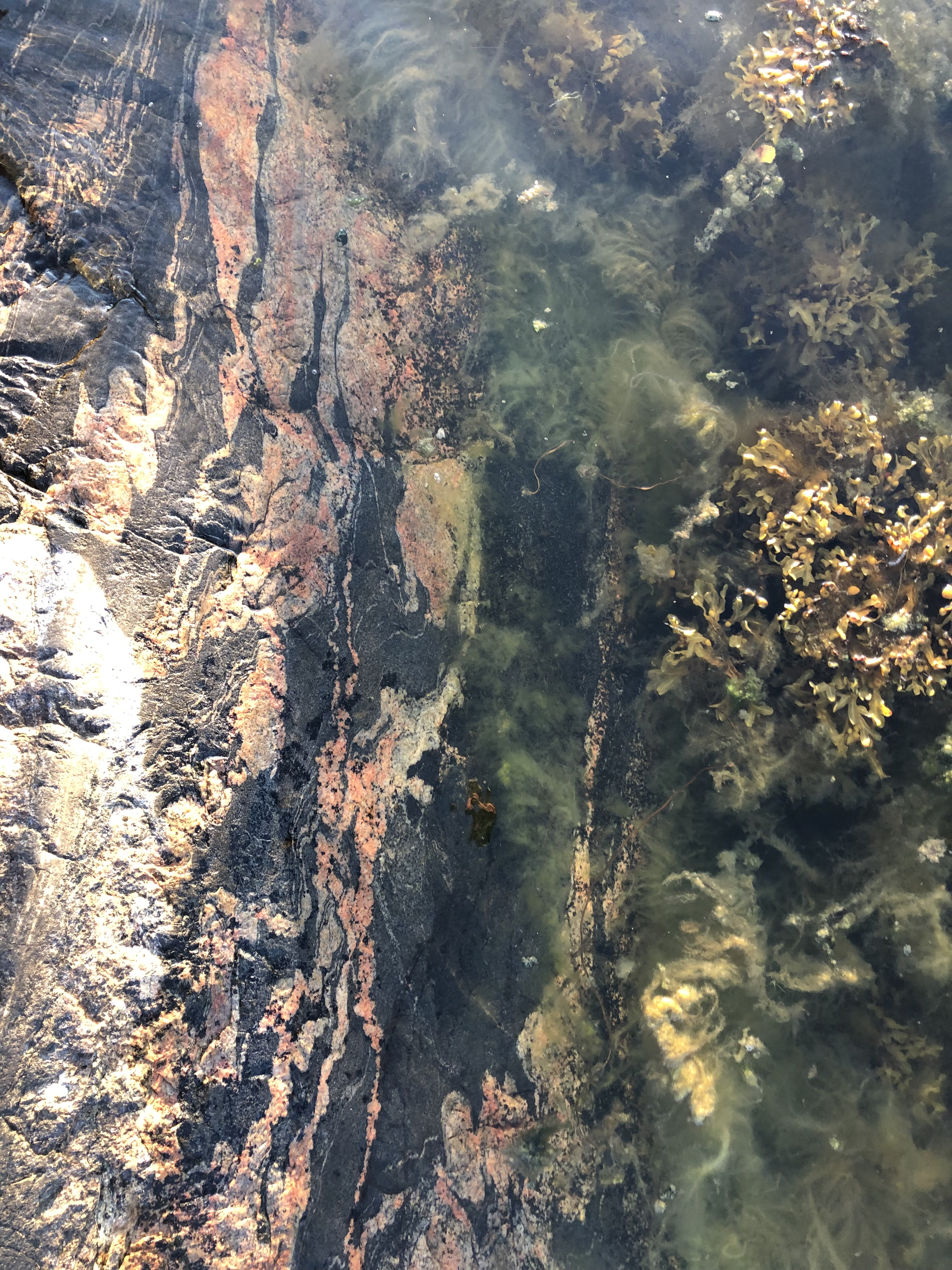 Bilden visar ett exempel på den blandade berggrund som är typisk för reservatet. Den visar också att strukturerna är som tydligast i närheten av vattenytan.